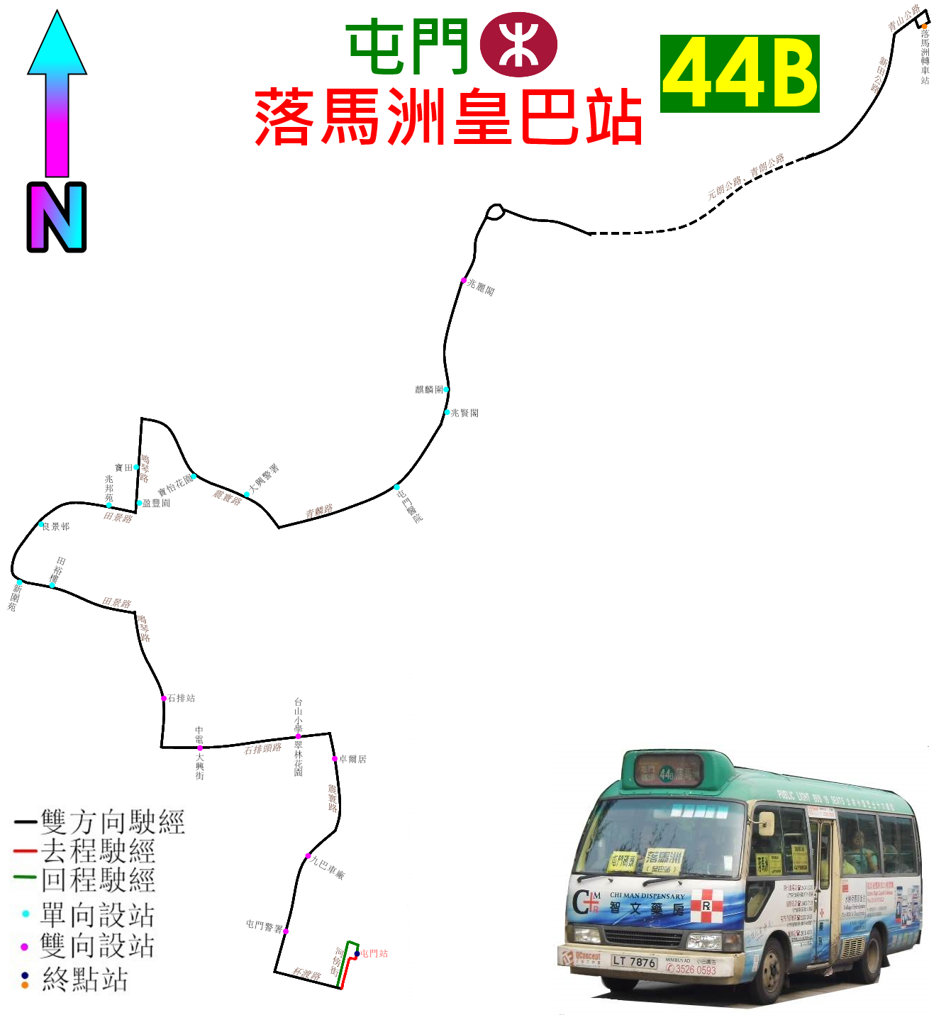 中文（香港）: 新界專線小巴44B線的走線圖